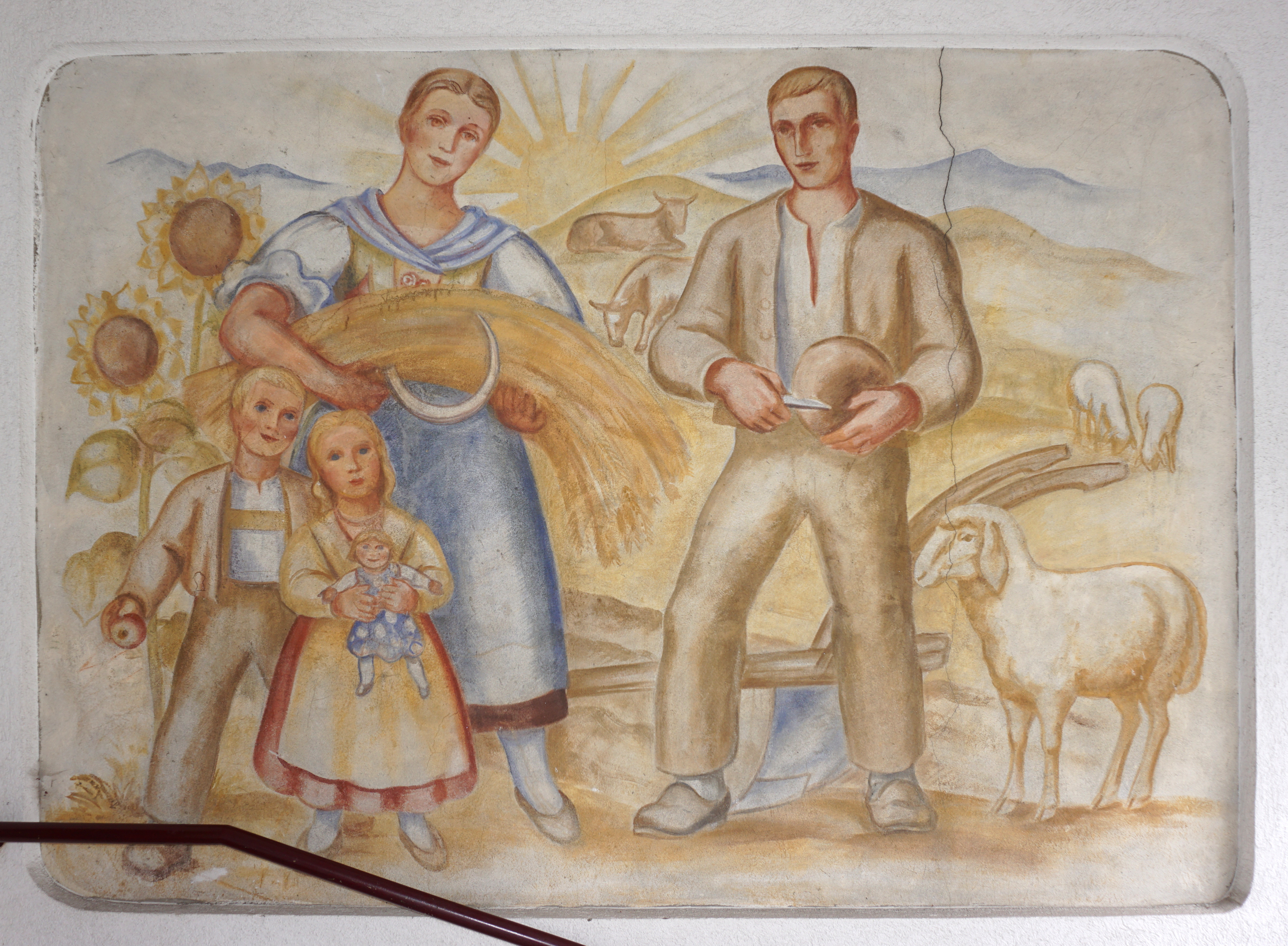 Das Wandbild Bauernfamilie befindet sich neben dem Eingang in das Schulgebäude. Künstler: Josef Prantl, 1901–1992 This media shows the remarkable cultural object in the Austrian state of Tyrol listed by the Tyrolean Art Cadastre with the ID 29915. (on tirisMaps, on tirisdienste.at, pdf, more images on Commons)